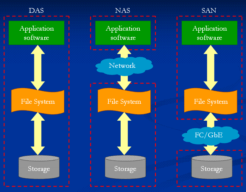 Comparative